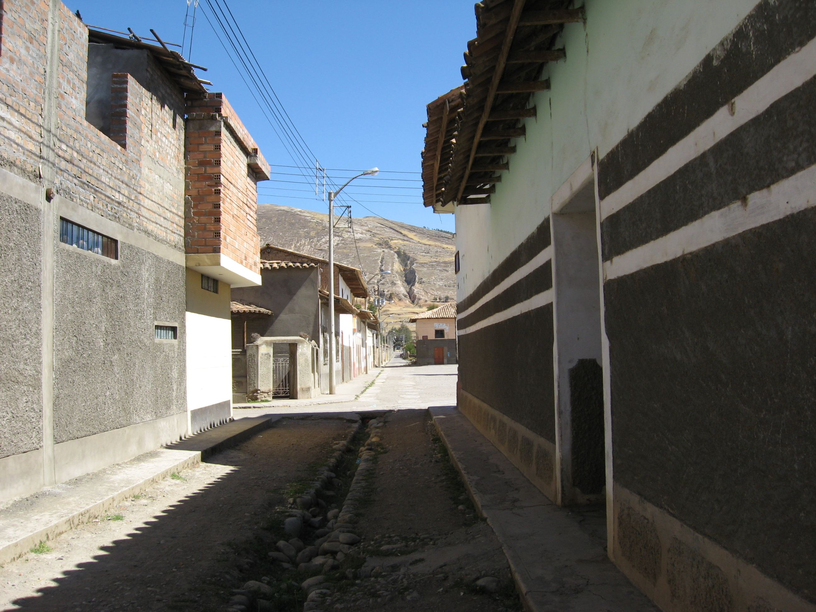 Amargura última cuadra